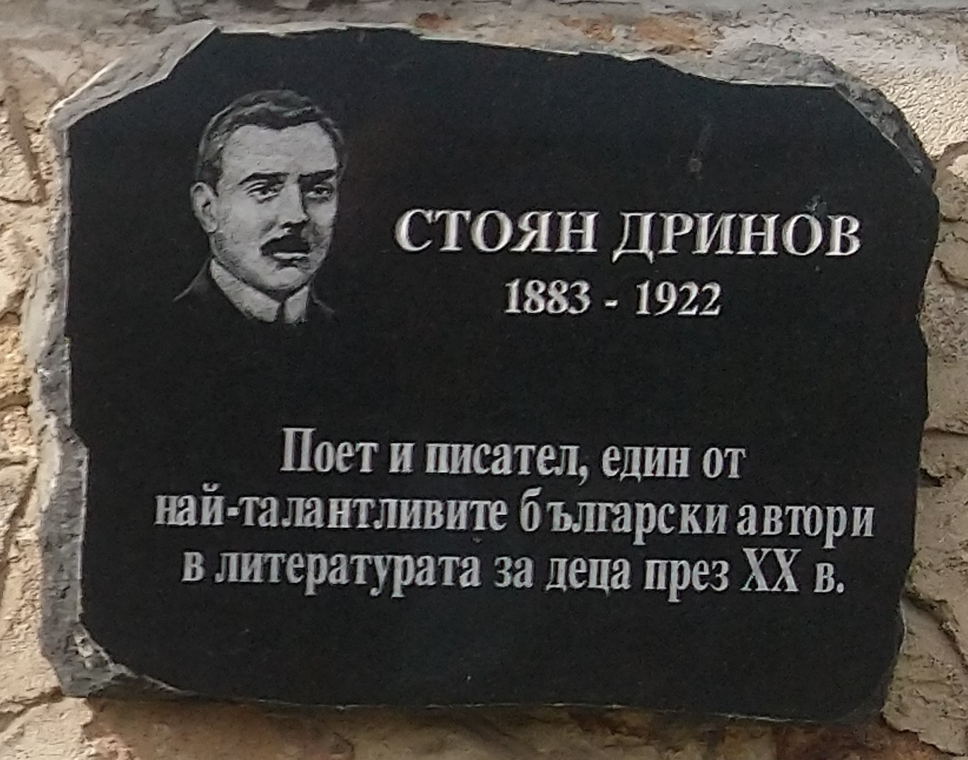 Стоян Дринов (1883 - 1922) - плоча в Исторически музей Панагюрище - Надпис: Поект и писател, един от най-талантливите български автори в литературата за деца през ХХ в.